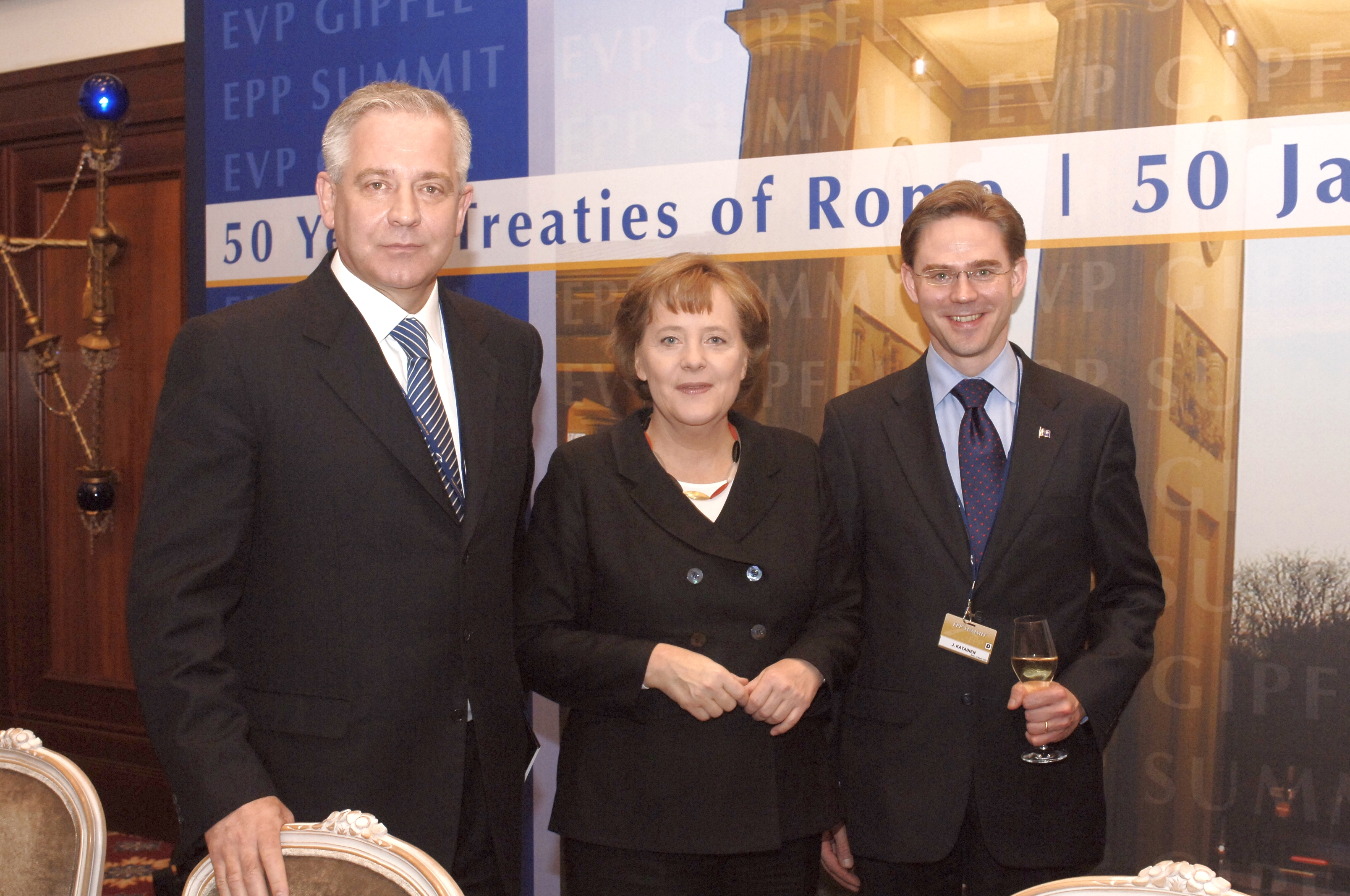 Ivo Sanader (left), Angela Merkel and Jyrki Katainen (right). EPP Summit 24 March 2007